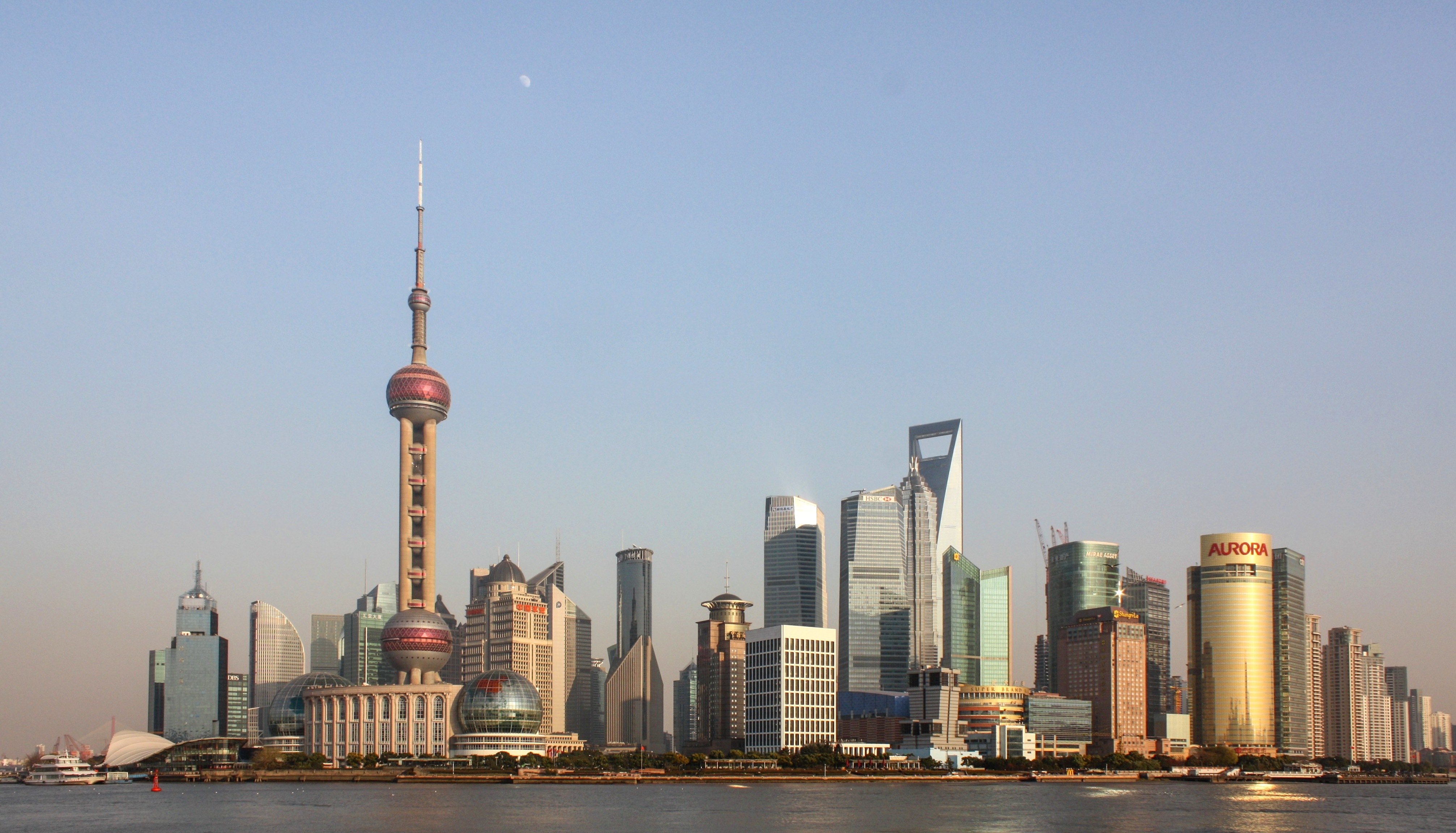 Tagesansicht von Pudong vom Bund aus.